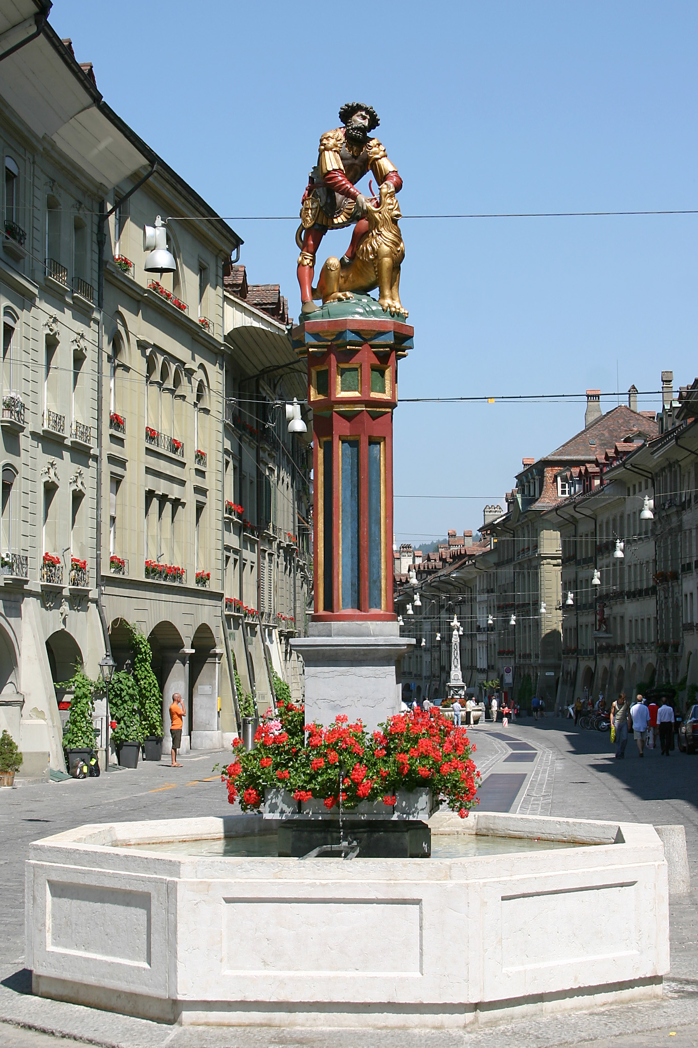 Simsonbrunnen, Bern, Switzerland